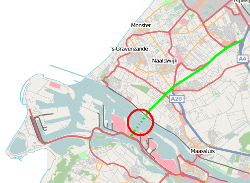 Oranjetunnel, A54, bij benadering